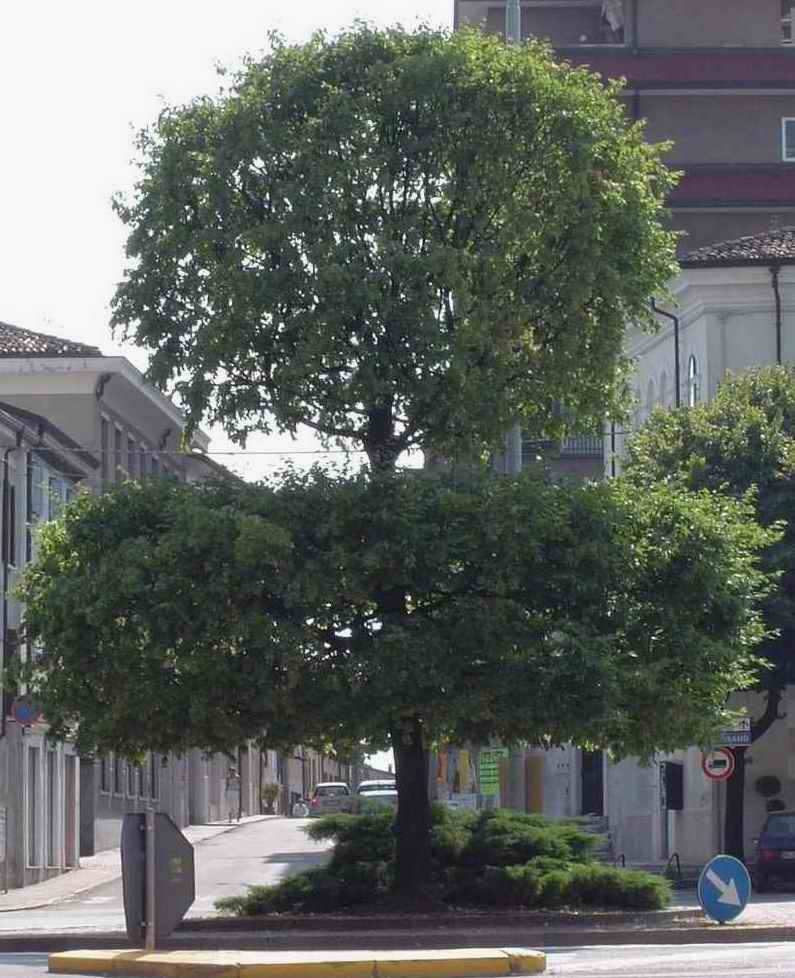 Carpine in una piazza di Carpenedolo